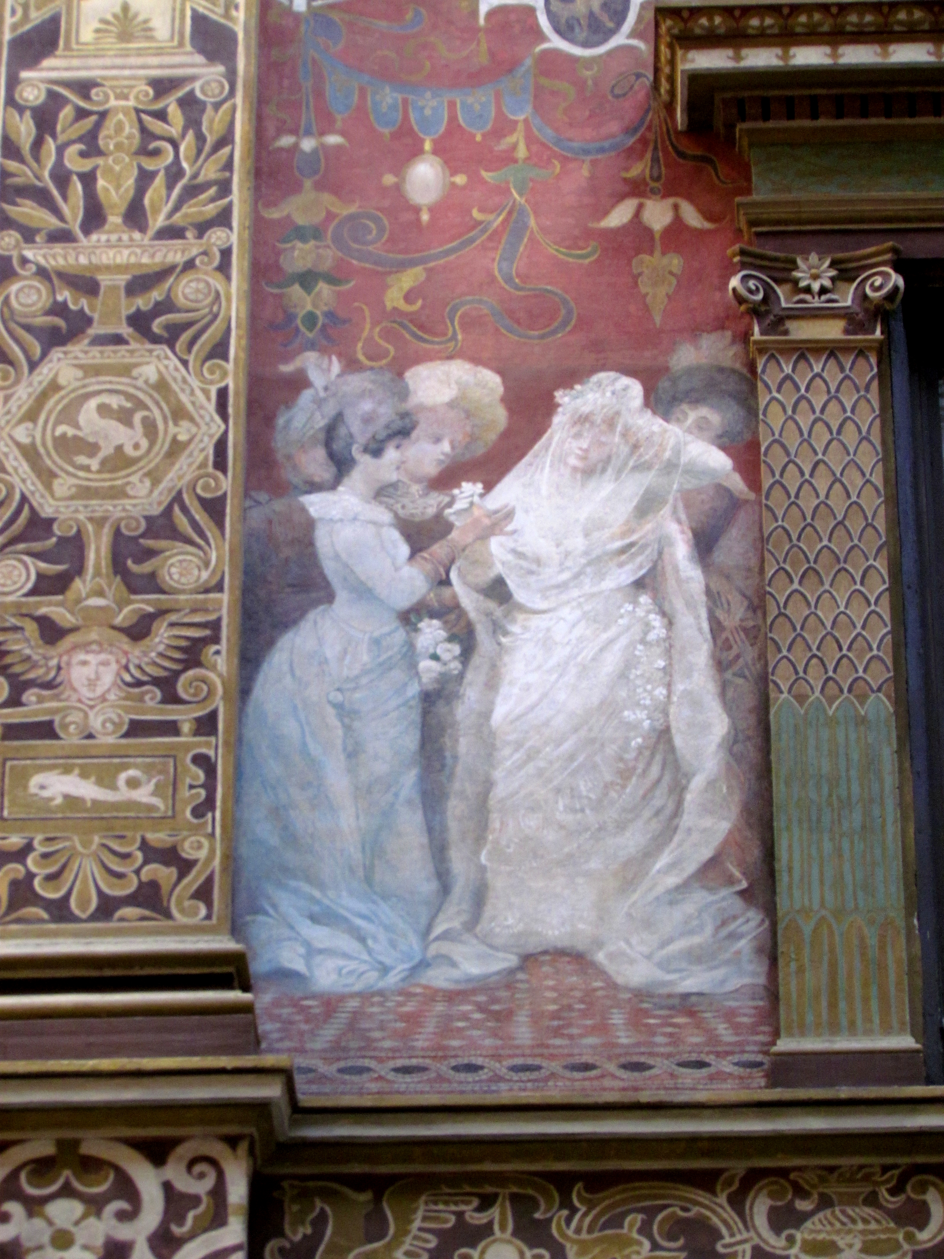 Bildinhalt: Gemälde im 1. Stock des Innenhofs der Galleria Sciarra Aufnahmeort: Rom, Italien